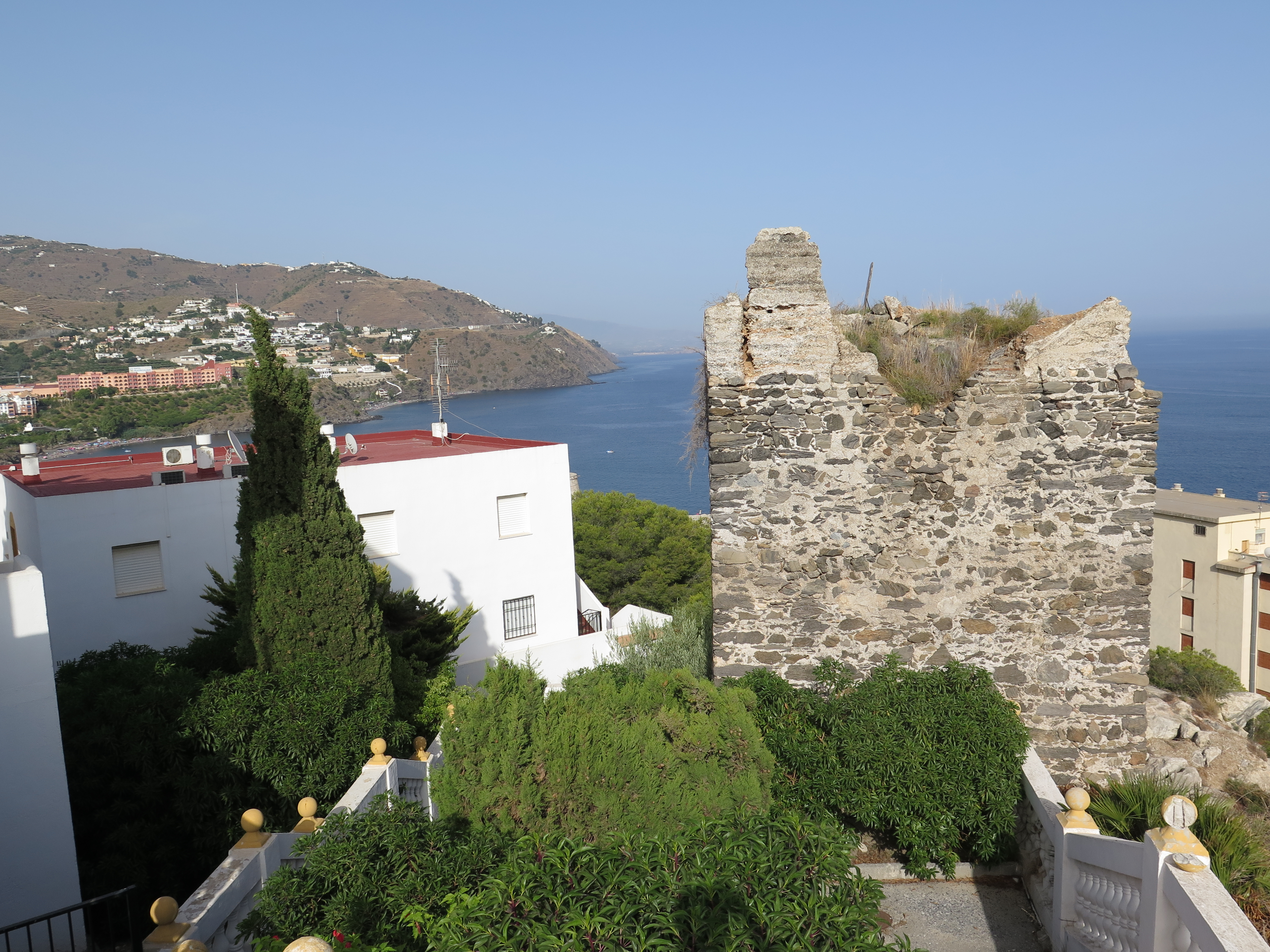 Vista de la Torre del Granizo, entre edificaciones de la costa de Almuñécar.